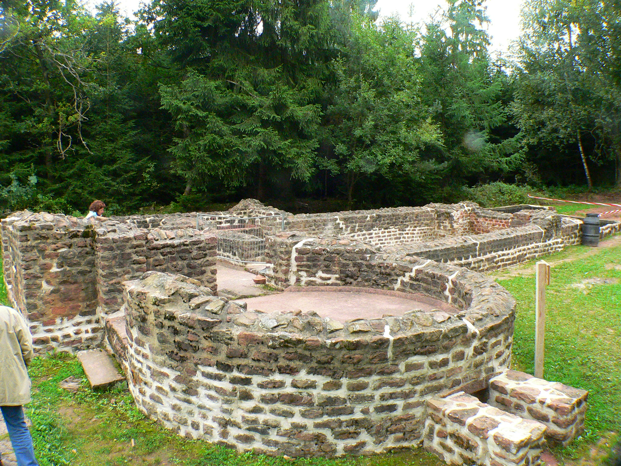 Das Römerbad am Kastell Würzberg, Odenwald, Deutschland